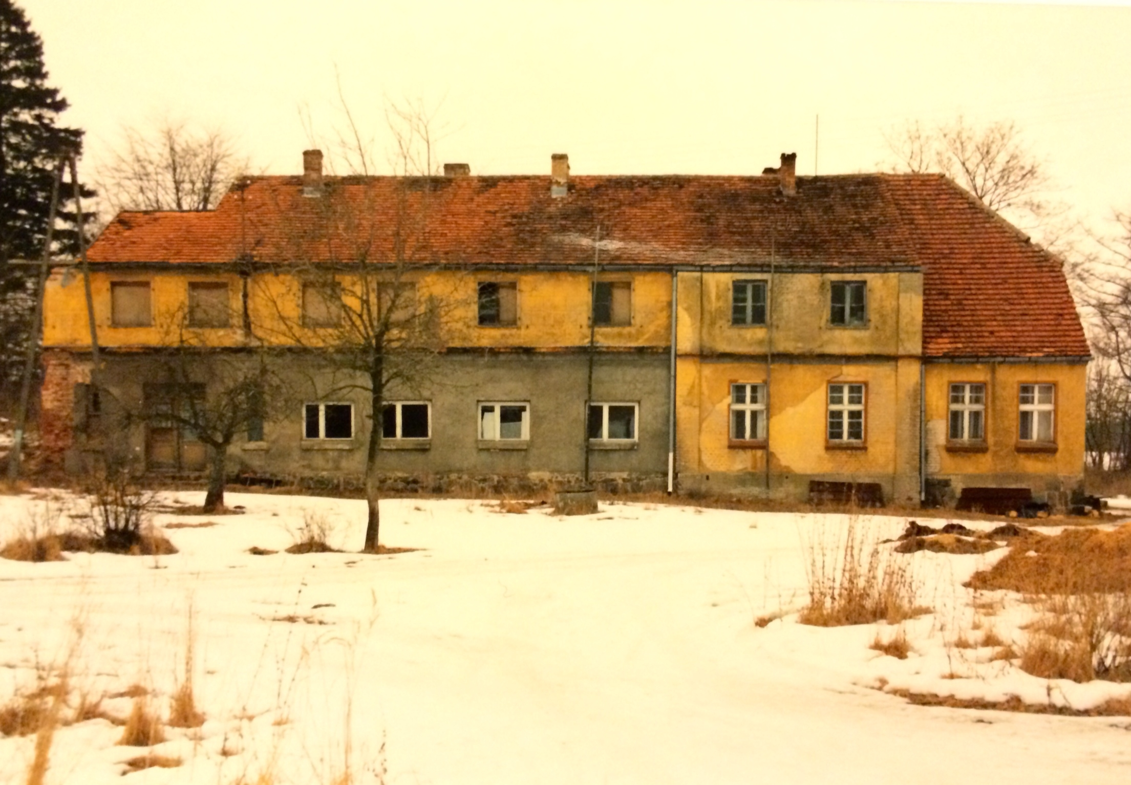 Smokęcino